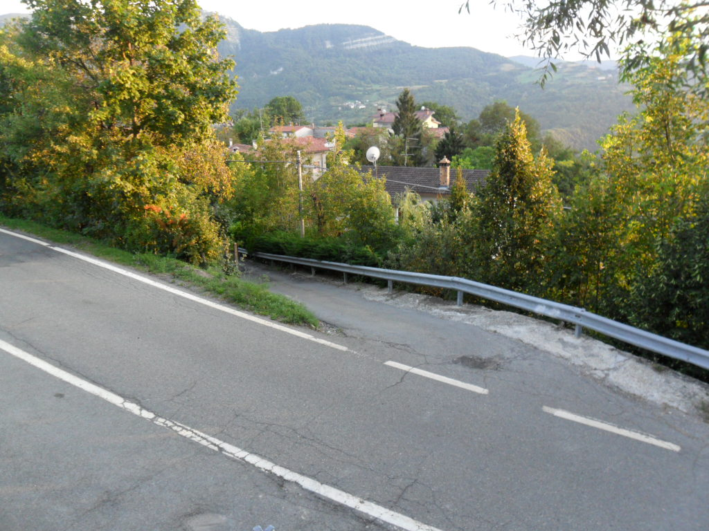 Badoni, sotto alla strada principale numero 15 e con la stradina che porta in centro paese